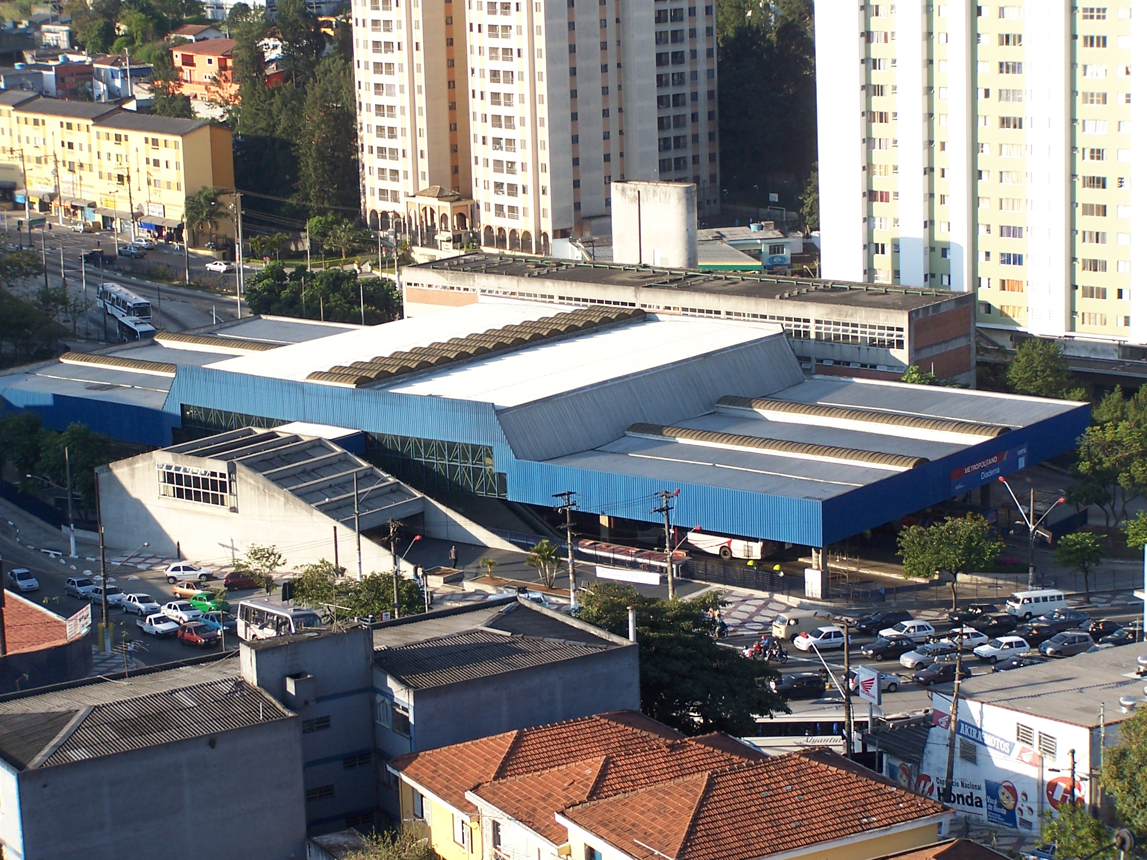 Visão aérea do terminal de ônibus de Diadema(SP-Brasil)